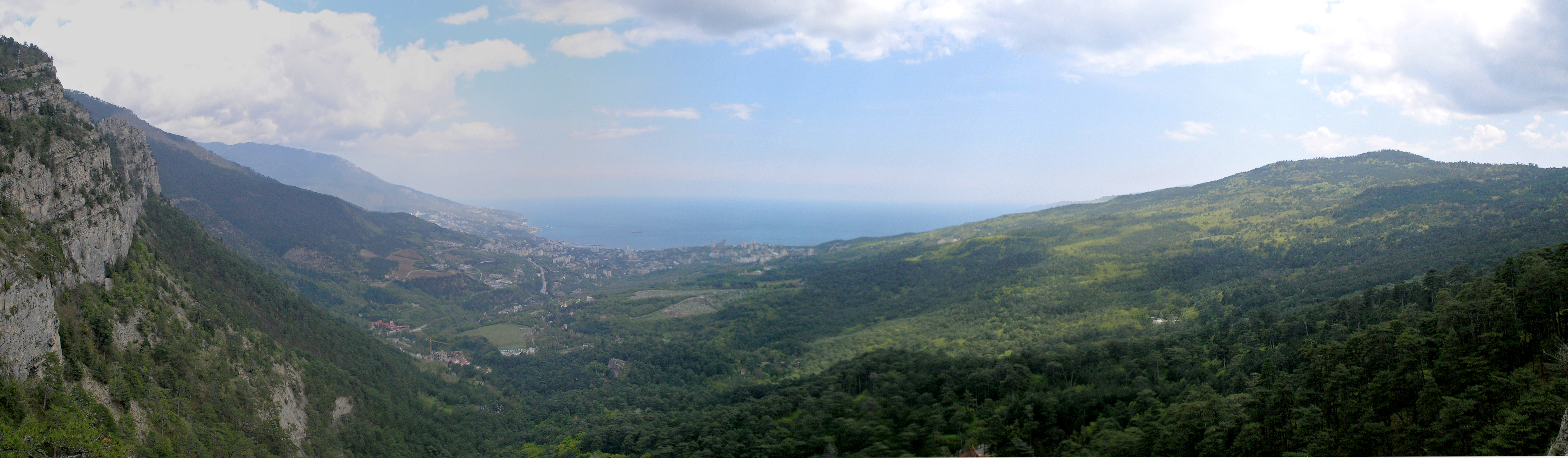 Россия, Крым. Вид на Ялту со Штангеевской тропы